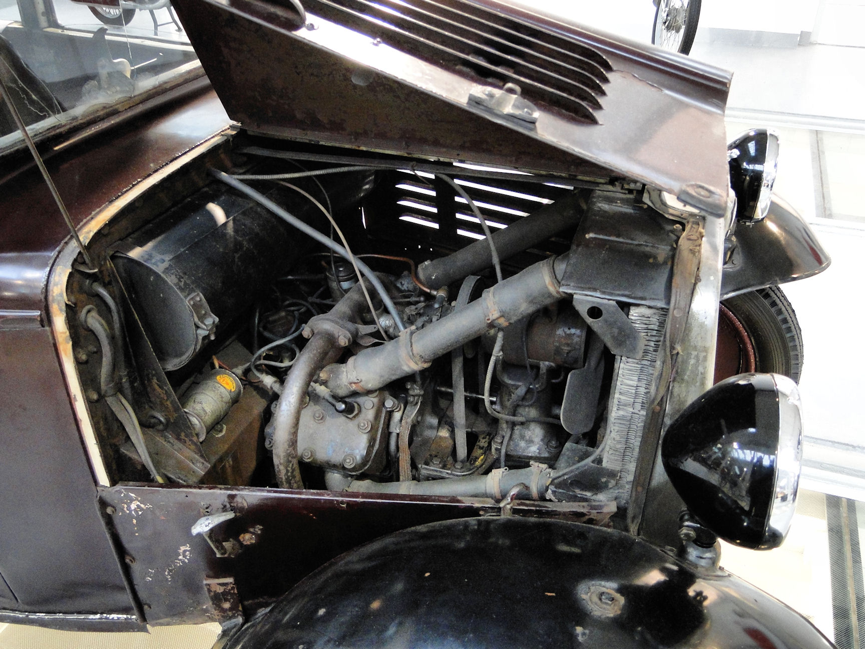 Samochód Stoewer V5, eksponowany w Muzeum Techniki i Komunikacji w Szczecinie